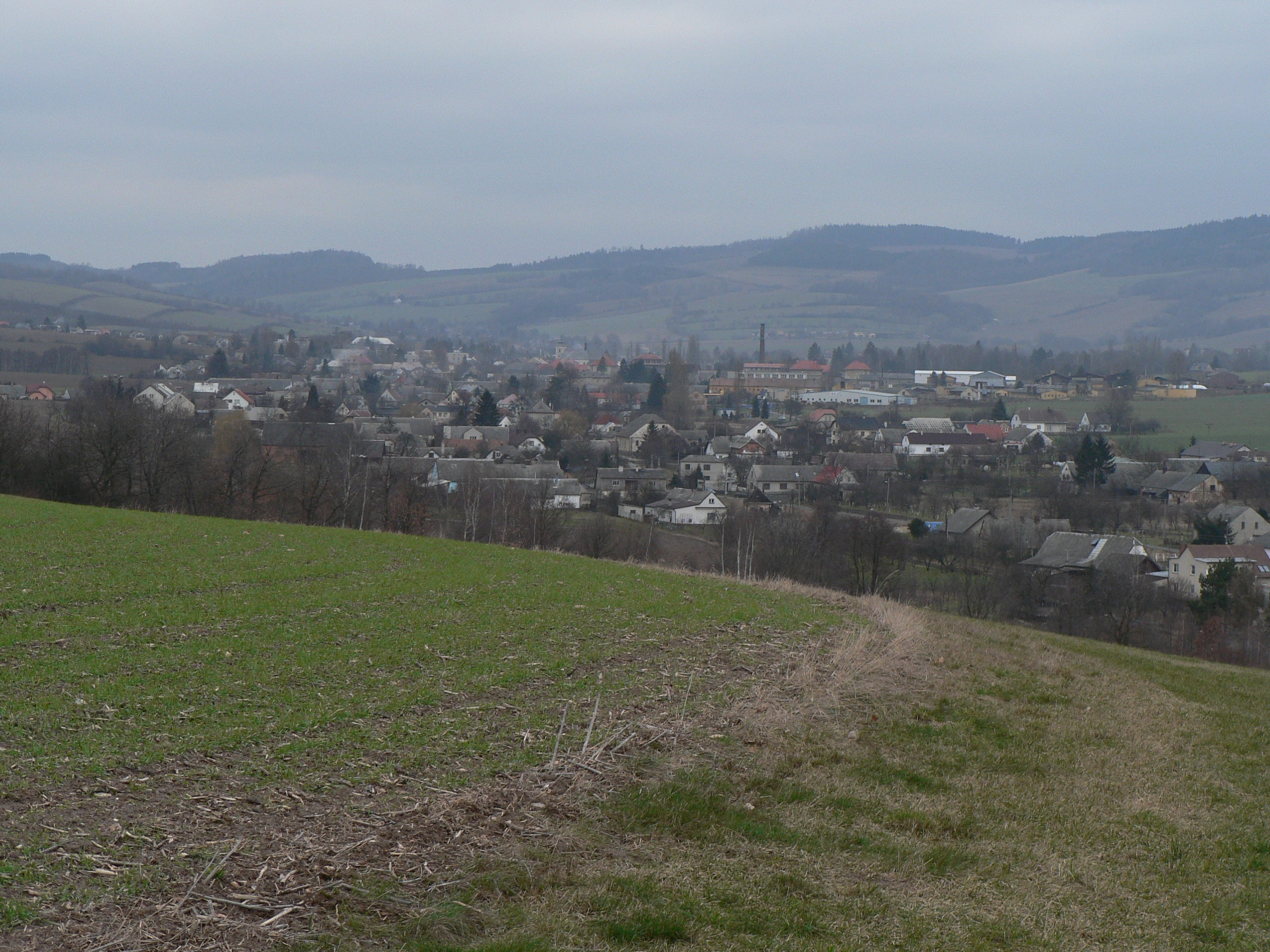 Libina, pohled na obec ze Zadního vrchu